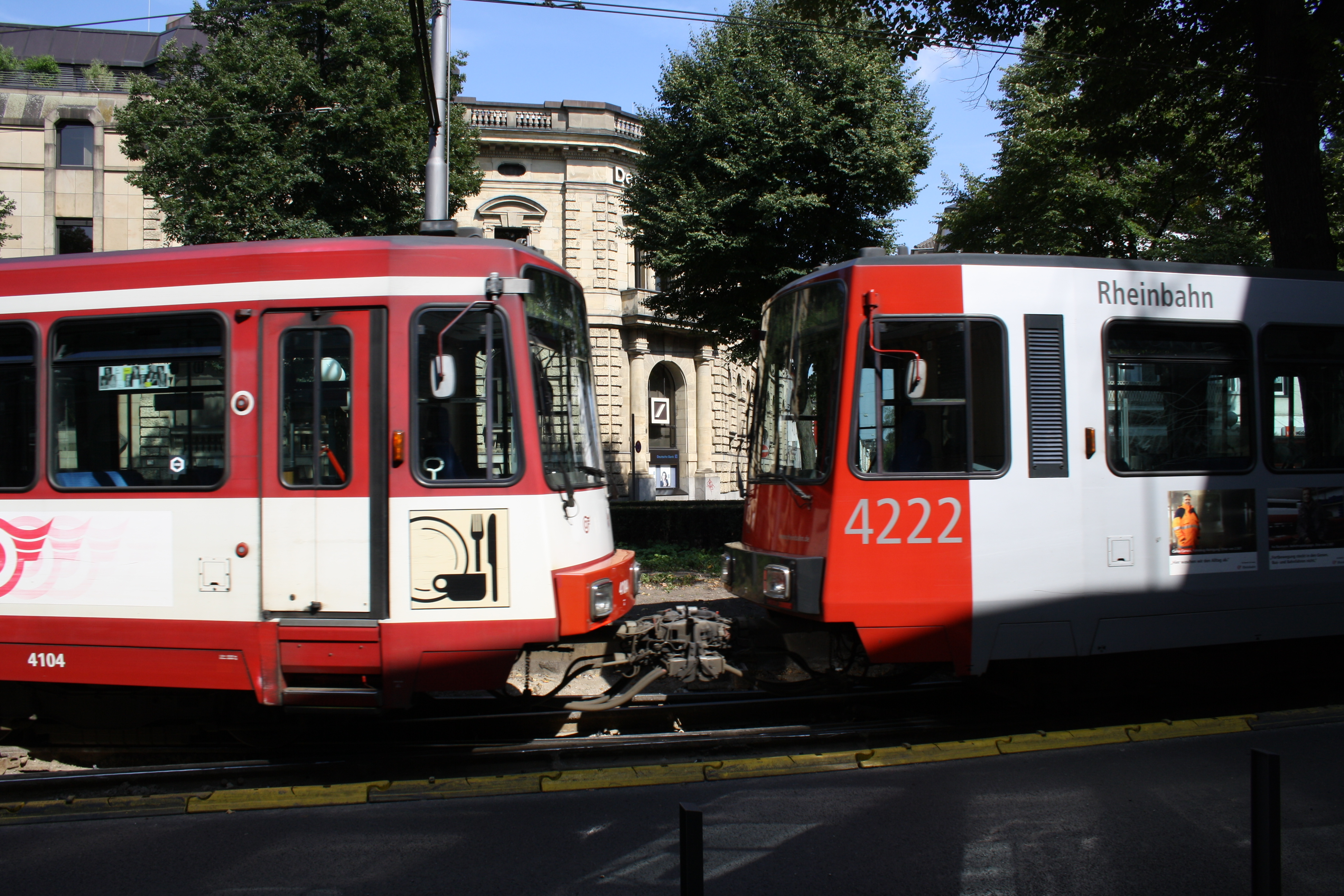 Stadtbahnwagen B der Rheinbahn in Krefeld